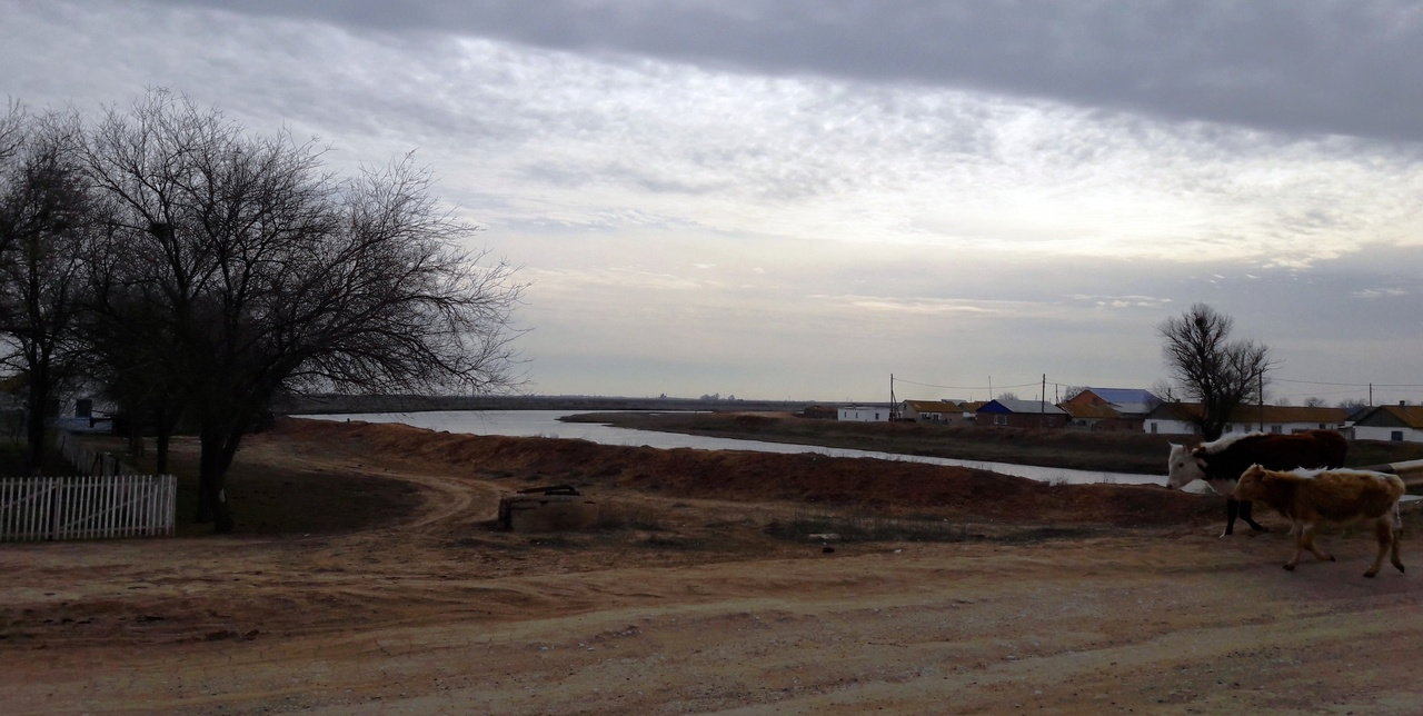 Қазақша (кирил): с.Хиуаз